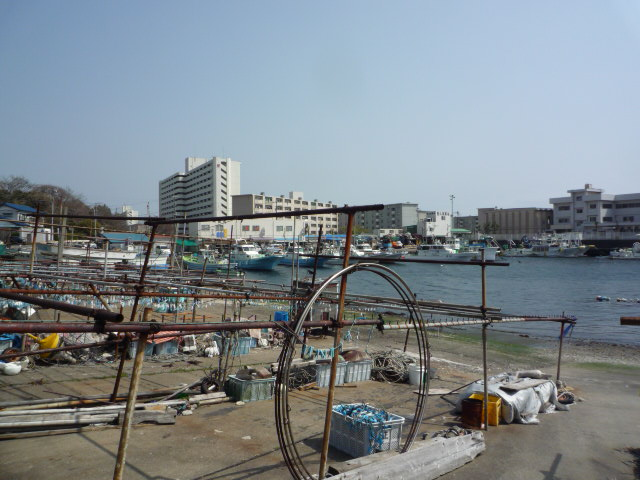 鴨居港を撮影